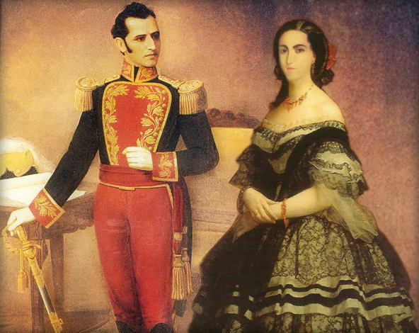 El héroe independentista venezolano Antonio José de Sucre, Gran Mariscal de Ayacucho; y su esposa, la quiteña Mariana Carcelén de Guevara, Marquesa de Solanda y Villarocha.